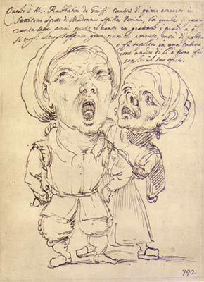 アンニーバレ・カラッチ（伝）によるカリカチュア。